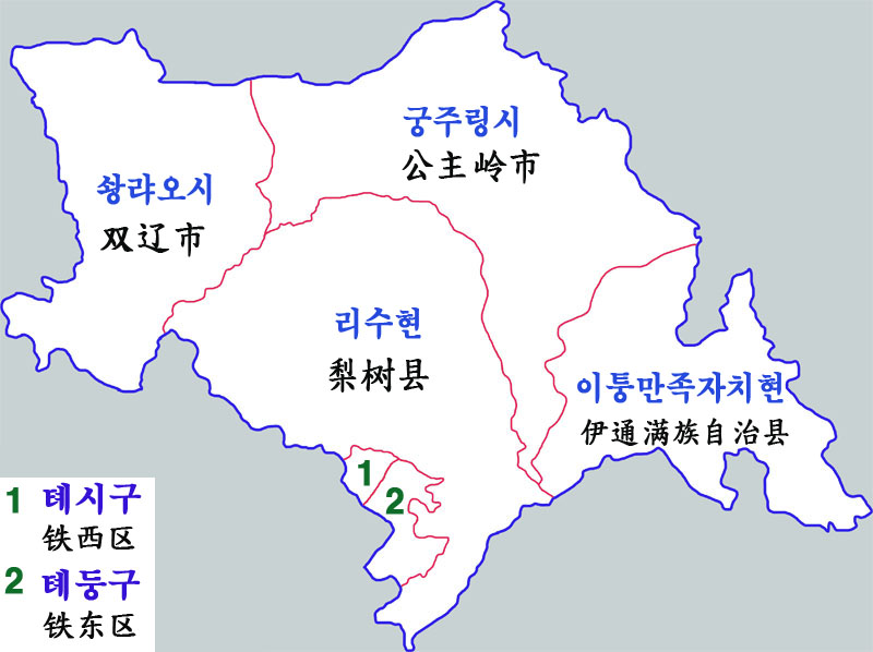 쓰핑시 현급행정구역